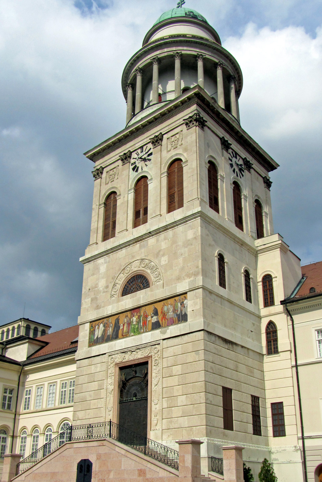 Bencés főapátsági templom (Pannonhalma, Várkerület 1 .) This is a photo of a monument in Hungary. Identifier: 4640